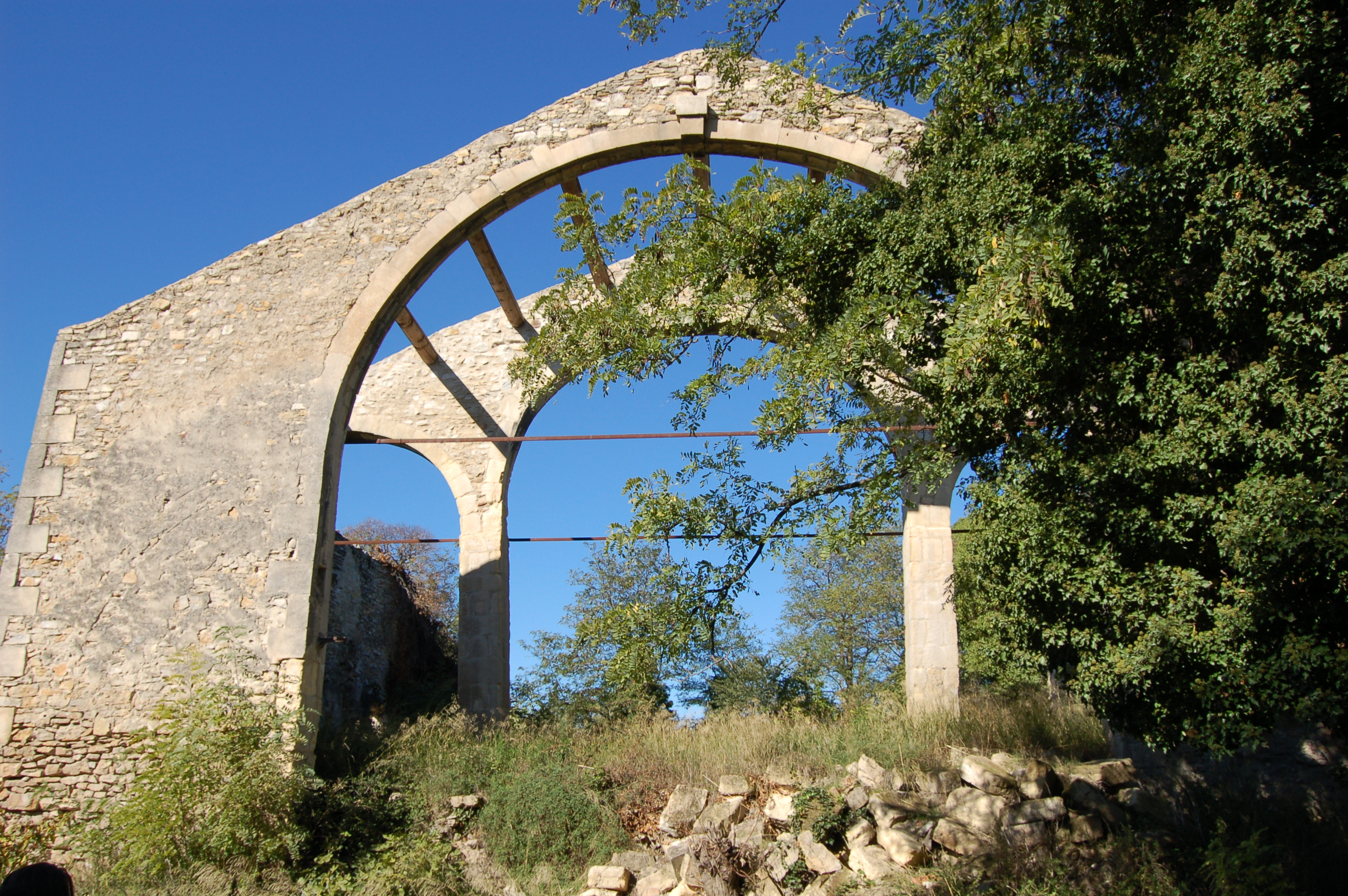 Bâtiment de 1783 arc plein cintre